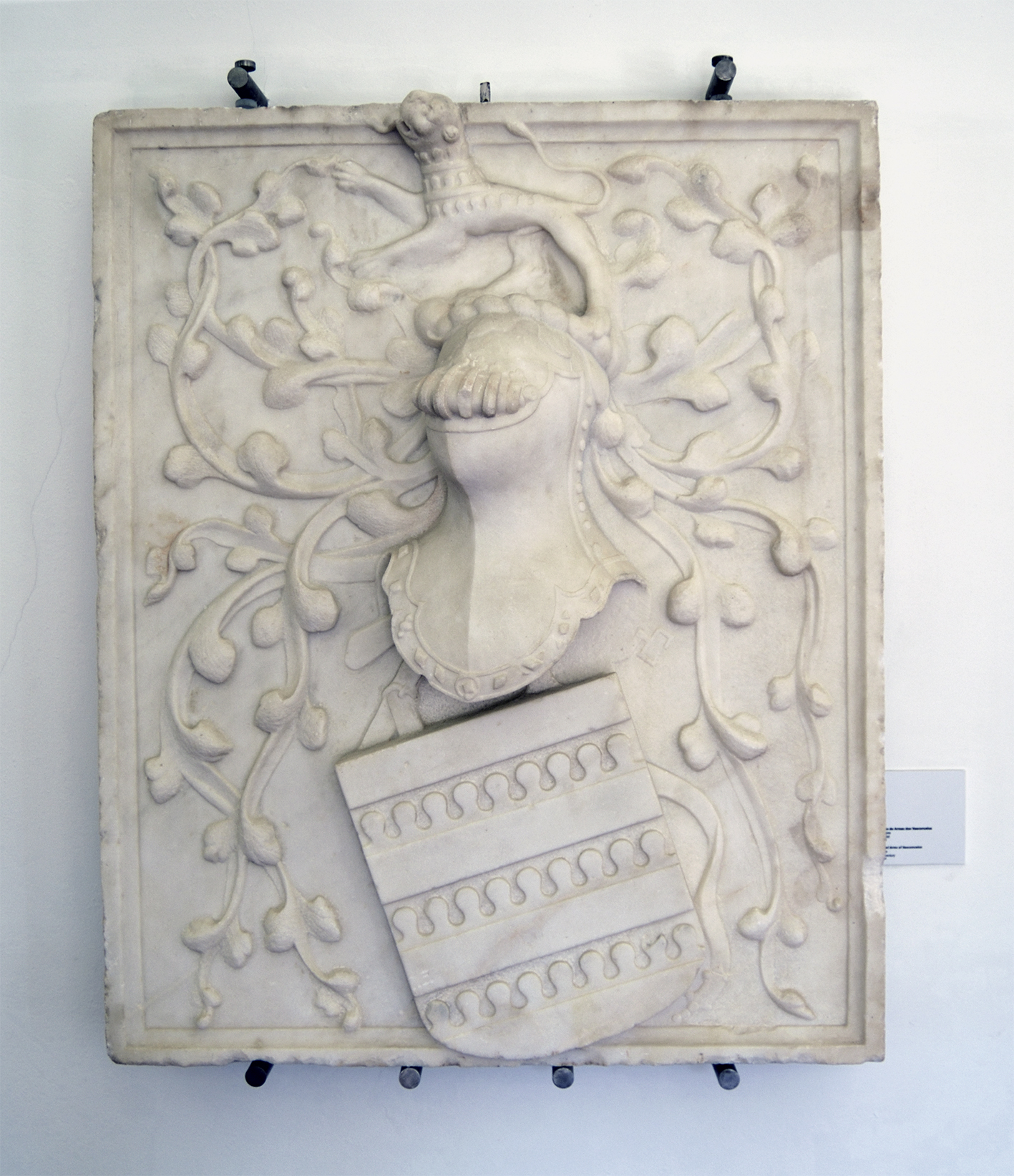 Brasão de Armas dos Vasconcelos